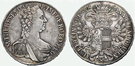 Ausbeutetaler des Silberwerkwerk Annaberg geprägt 1765 in Wien